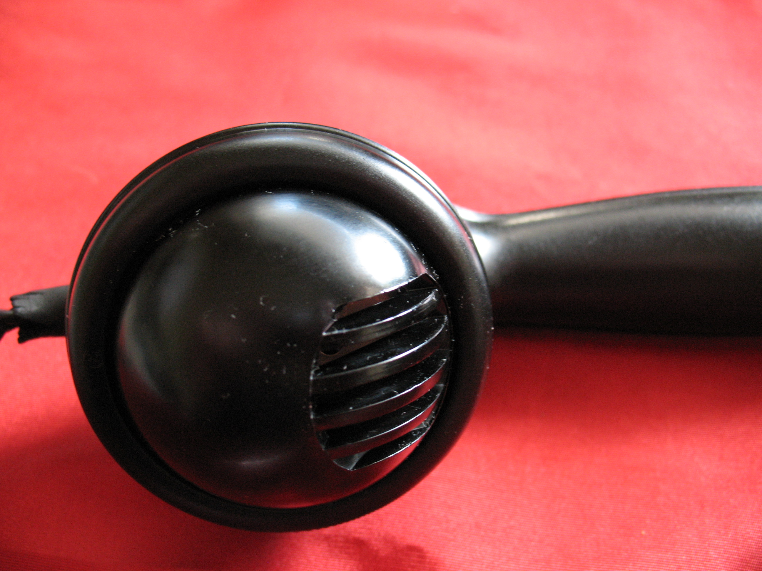 Sprechmuschel, Einsprache, eines Handapparat vom W 28